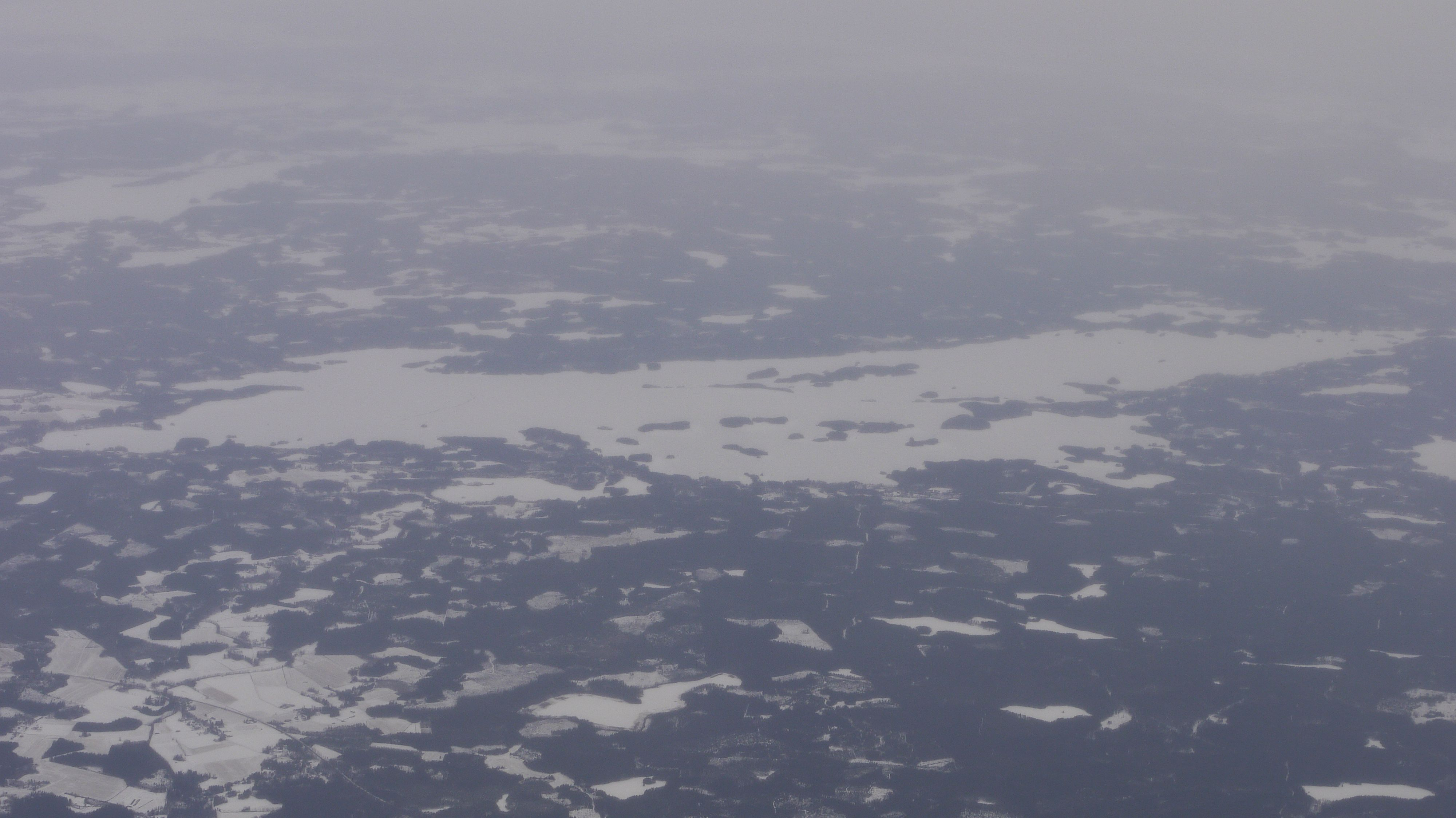 Jäätynyt Kuohijärvi Hämeenlinnassa helmikuussa 2017.